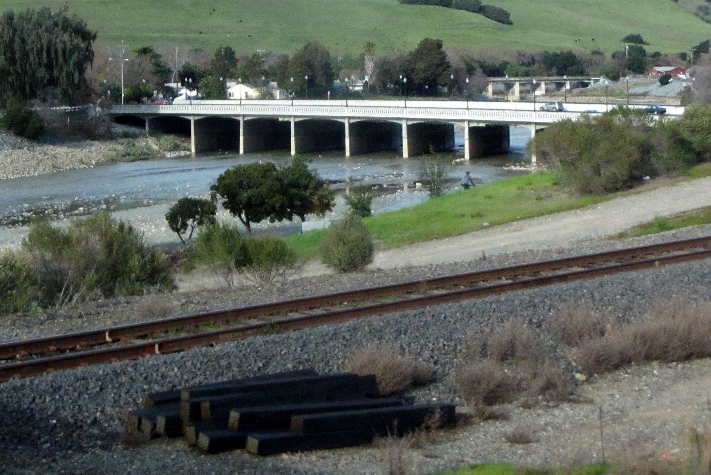 Alameda Creek